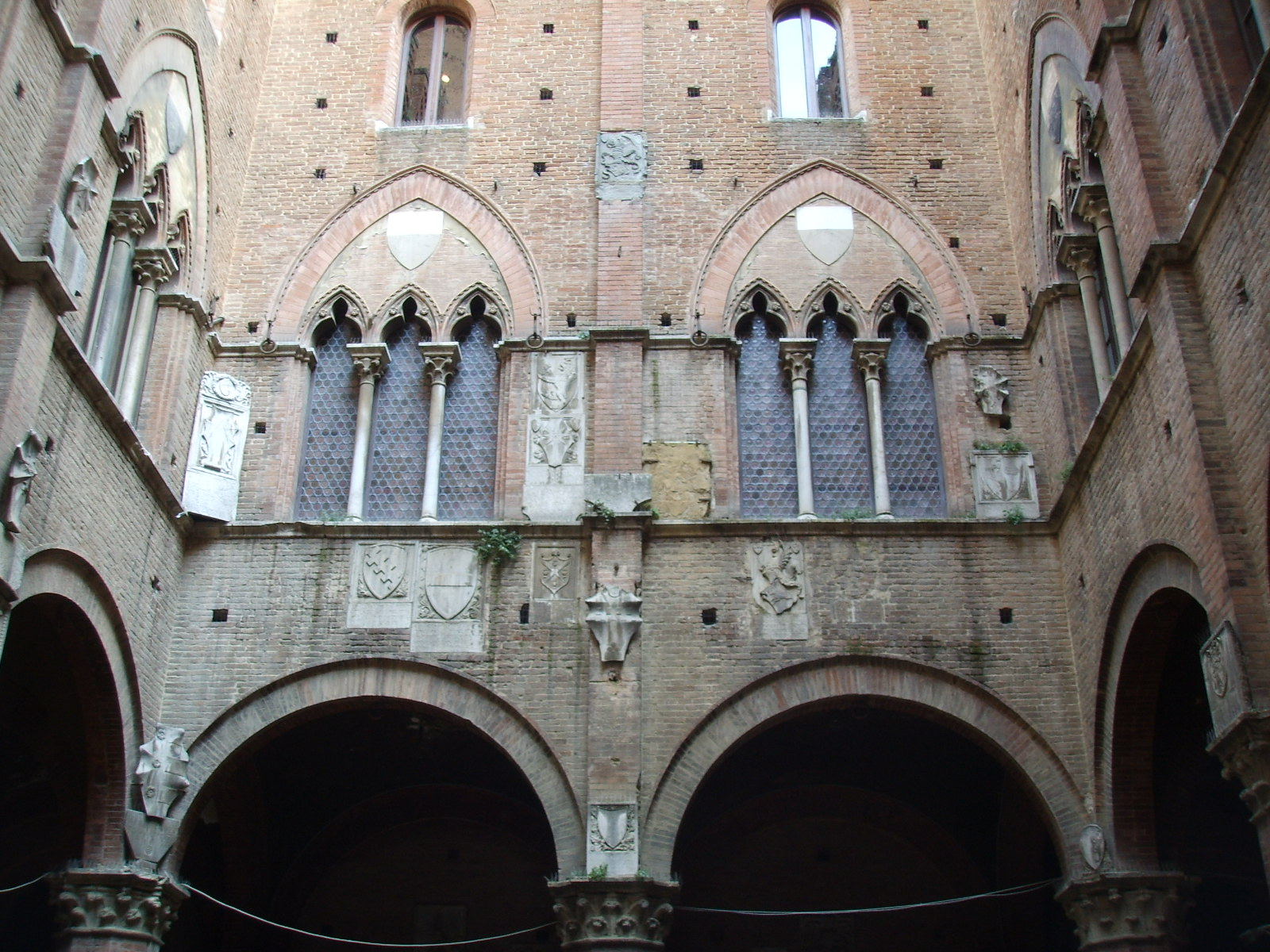 Palazzo Pubblico, courtyard, in Siena, Italy